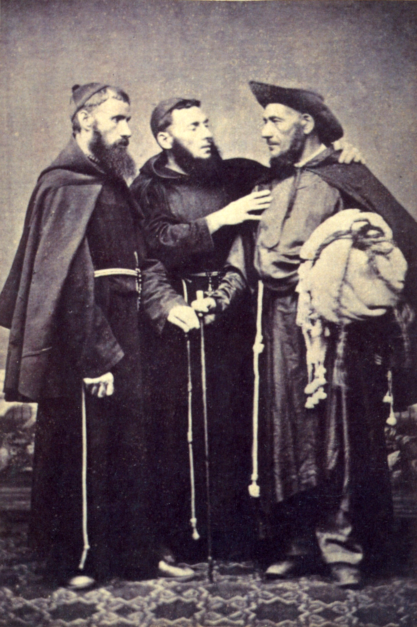 Brazilian friars, c.1875.